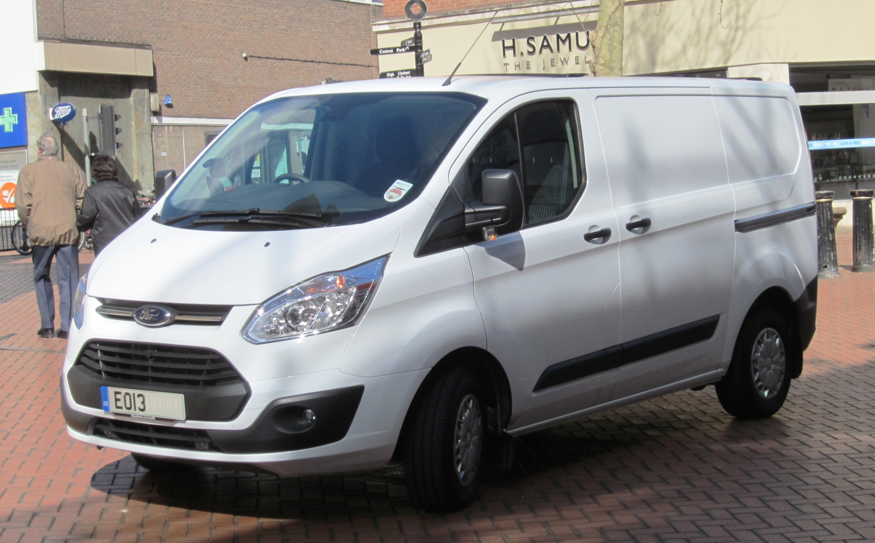 Ford Transit 2013 (Chemsford)